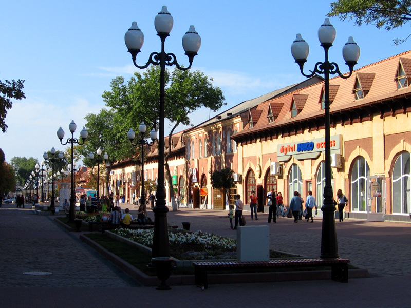 Ейск. Гостиный двор. Современный облик